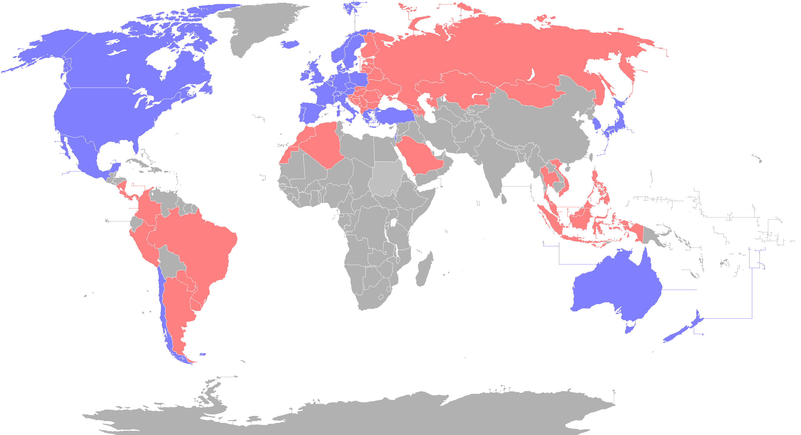 2018ko PISA probetan parte hartuko duten herrialdeak. Morez ELGA-OCDEko herrialdeak. Arrosaz parte hartuko duten beste estatu batzuk.